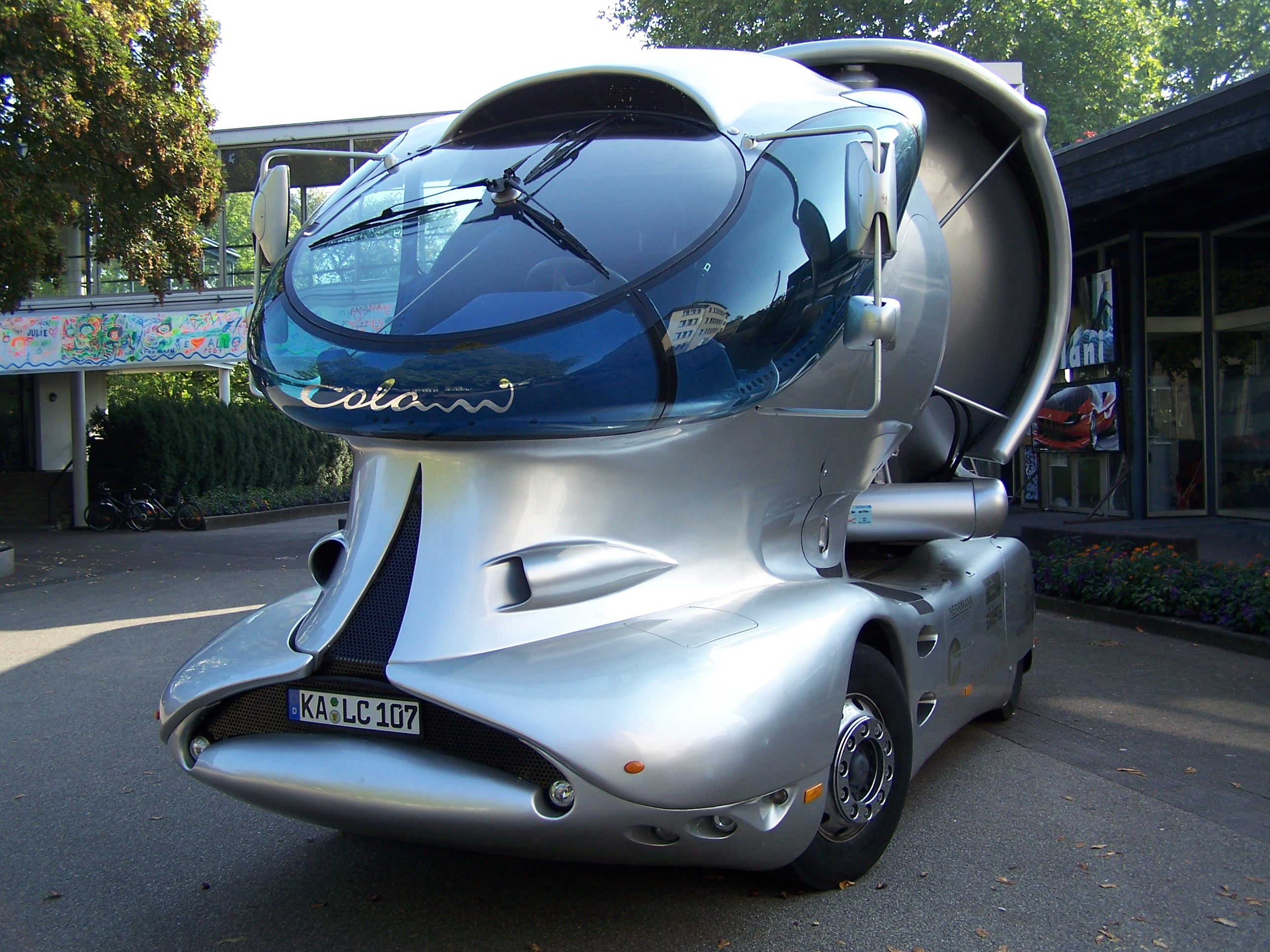 Aliens sind gekommen?